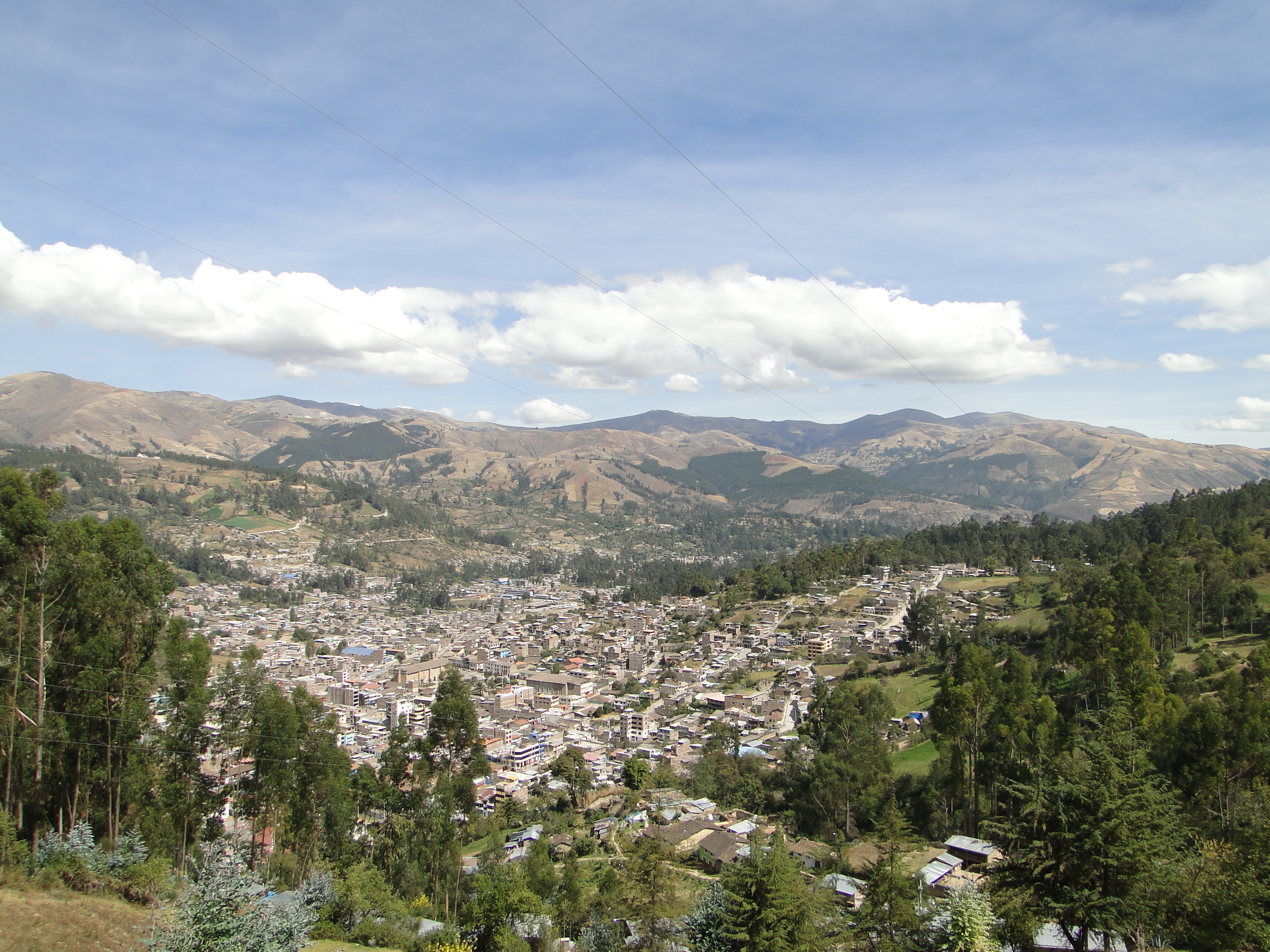 Vista panorámica del valle de Antahuaylla, donde aparece la ciudad de Andahuaylas.